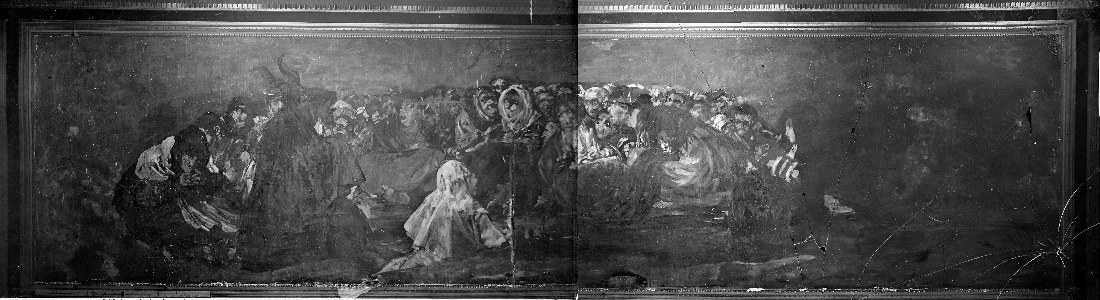 Fotografía del Aquelarre de F. de Goya por J. Laurent, 1874, antes de su arranque del muro y traslado a lienzo. Negativos de vidrio al colodión húmedo, "Archivo Ruiz Vernacci", Instituto del Patrimonio Cultural de España (IPCE), Ministerio de Educación, Cultura y Deporte. Ciudad Universitaria (Madrid, España). Fotomontaje a partir de los dos trozos de la fuente.